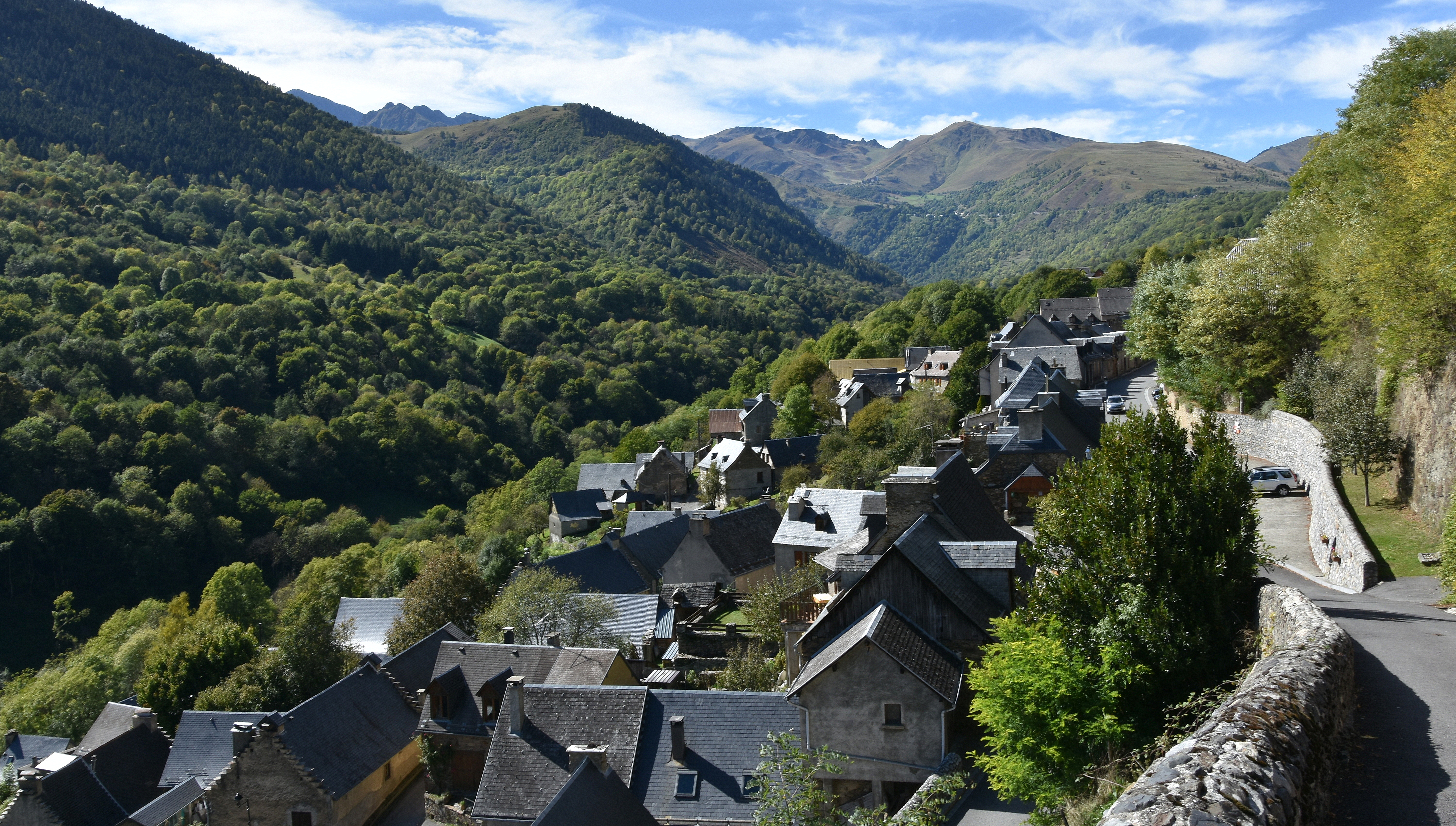 Saint-Aventin 7-10-2019 14-11-16